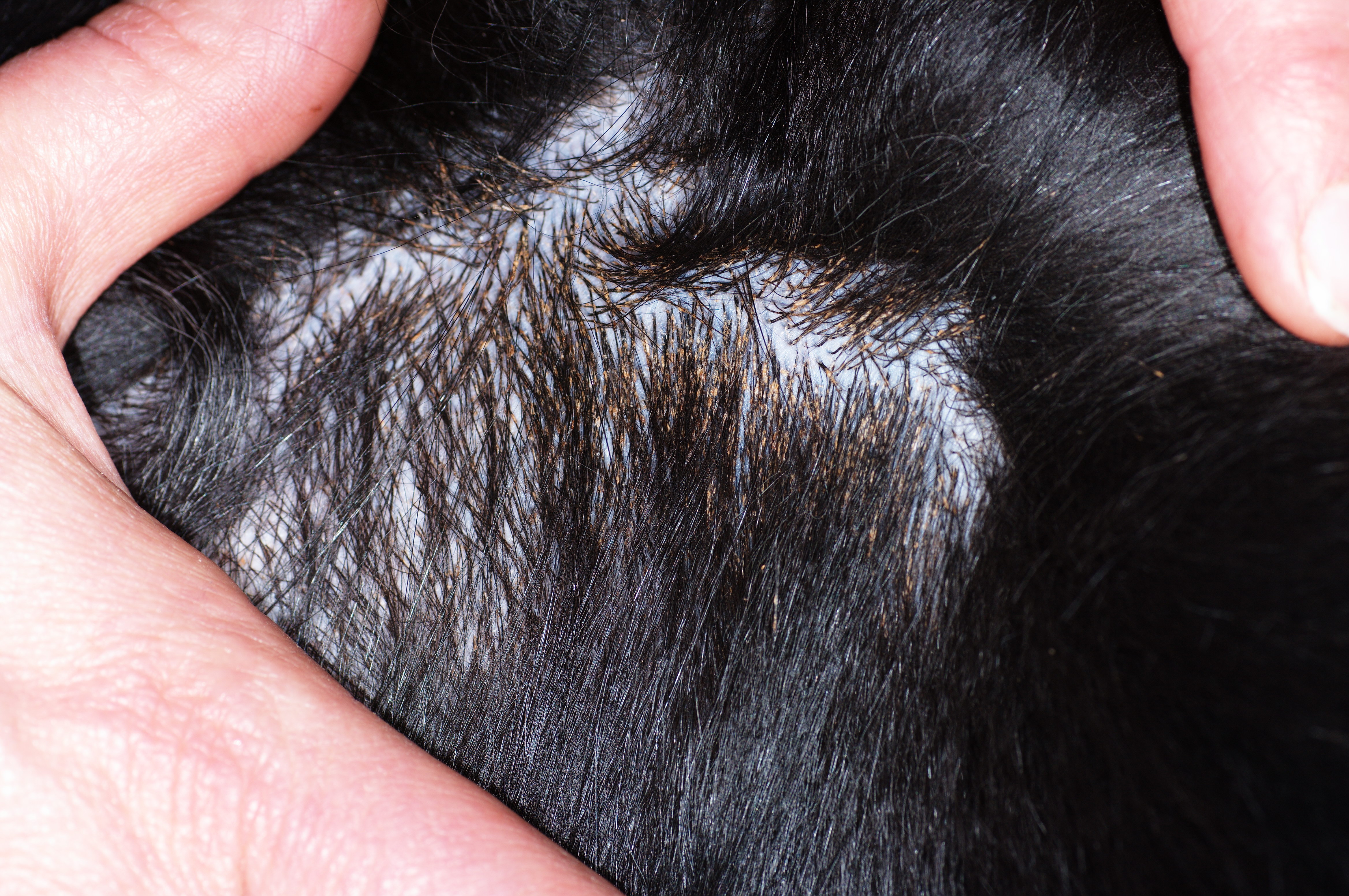 Makrofotographie einer Sebadenitis bei einem 7jährigen Hovawartrüden (Geo von der Tannenmühle). Bei voller Auflösung sind die ausgeprägten Keratin-Manschetten an den Haaren gut zu erkennen. Die in diesem Fall leichte Form der Erkrankung mit einzelnen, nur wenigen cm² großen betroffenen Arealen ist bei dem langhaarigen Hund nur bei sorgfältiger Untersuchung erkennbar.